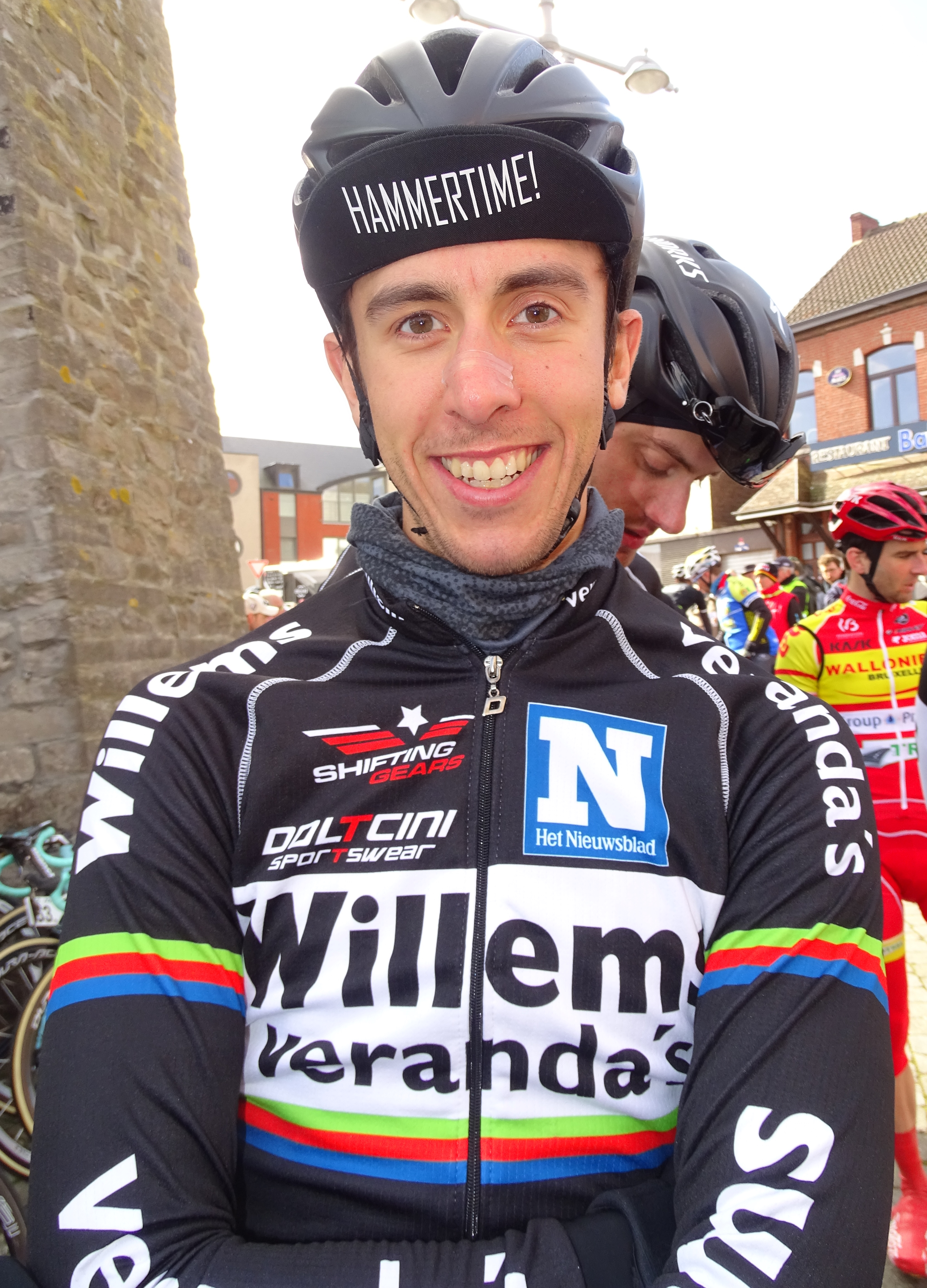 Reportage réalisé le mercredi 2 mars à l'occasion du départ du Samyn des Dames 2016 et du Samyn 2016 à Quaregnon, Belgique.